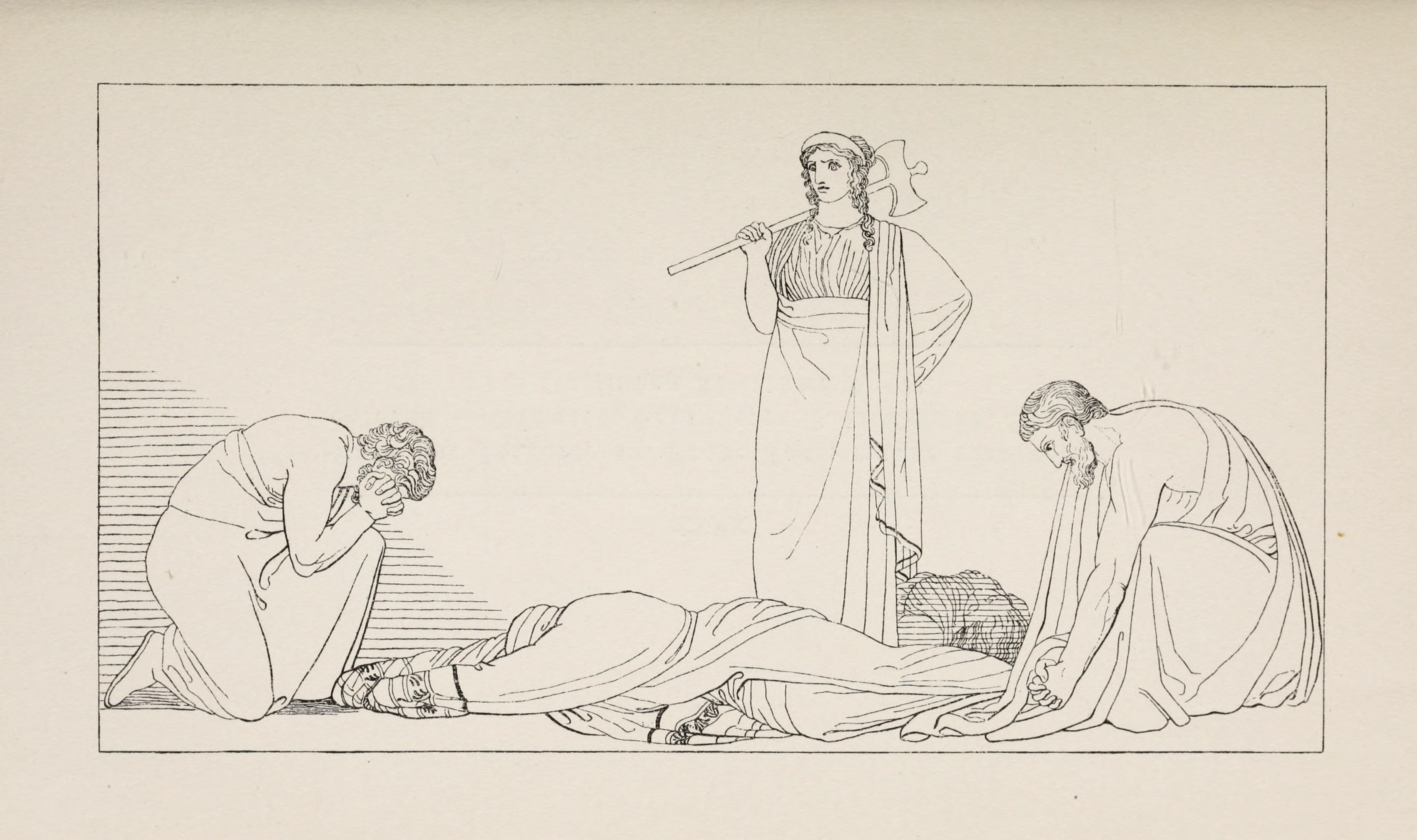 Klytaimnestra an den Leichen Agamemnons und Kassandras, der Chor klagend um seinen König. – Äschylos, Agamemnon V. 1490. Schwab, Sagen des klassischen Altertums II. 162f.